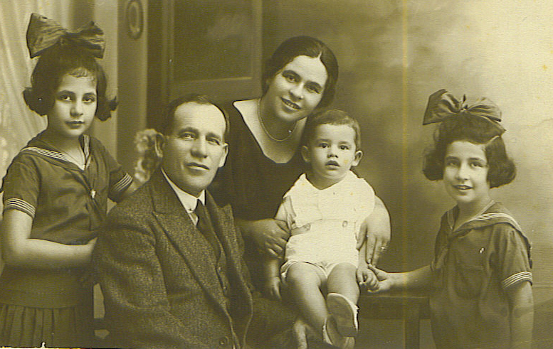 משפחת יהודה לייב פוחובסקי